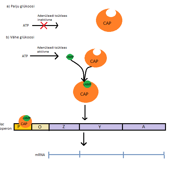 a) Kui kasvukeskkonnas on palju glükoosi, siis on adenülaadi tsüklaas inaktiivne ning ATP-st ei toodeta cAMP-d. CAP valku ei aktiveerita ja transkriptsiooni laktoosi operonilt ei toimu. b) Glükoosi puudumisel kasvukeskkonnas on adenülaadi tsüklaas aktiivne ning ATP-st toodetakse cAMP-d. cAMP moodustab kompleksi CAP valguga ning CAP valk aktiveeritakse. Moodustunud CAP/cAMP kompleks seondub laktoosi operoni promootoralale P ning toimub tranksriptsioon laktoosi operonilt.